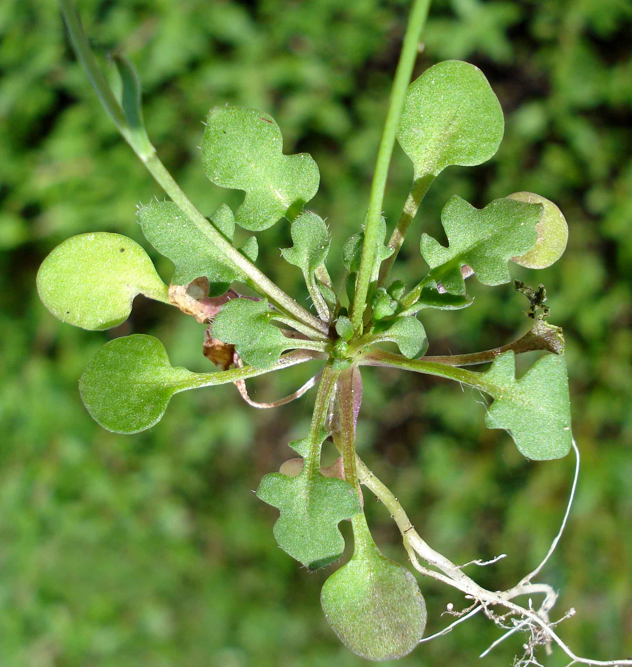 Teesdalia nudicaulis (Unterfranken, Germany)